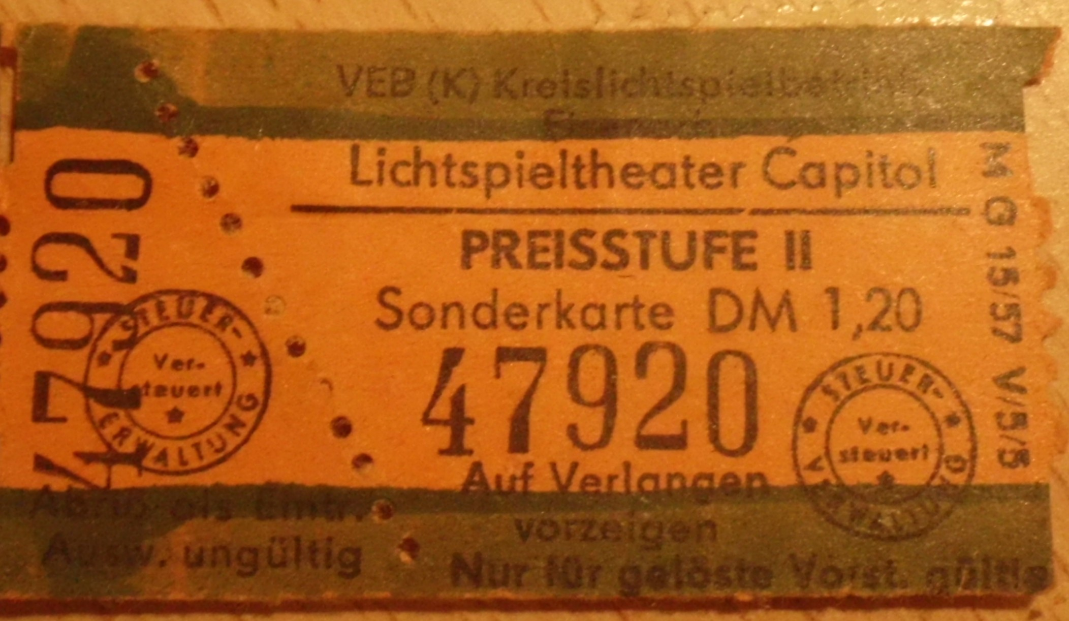 Eintrittskarte des Capitol-Kinos Eisenach von 1959